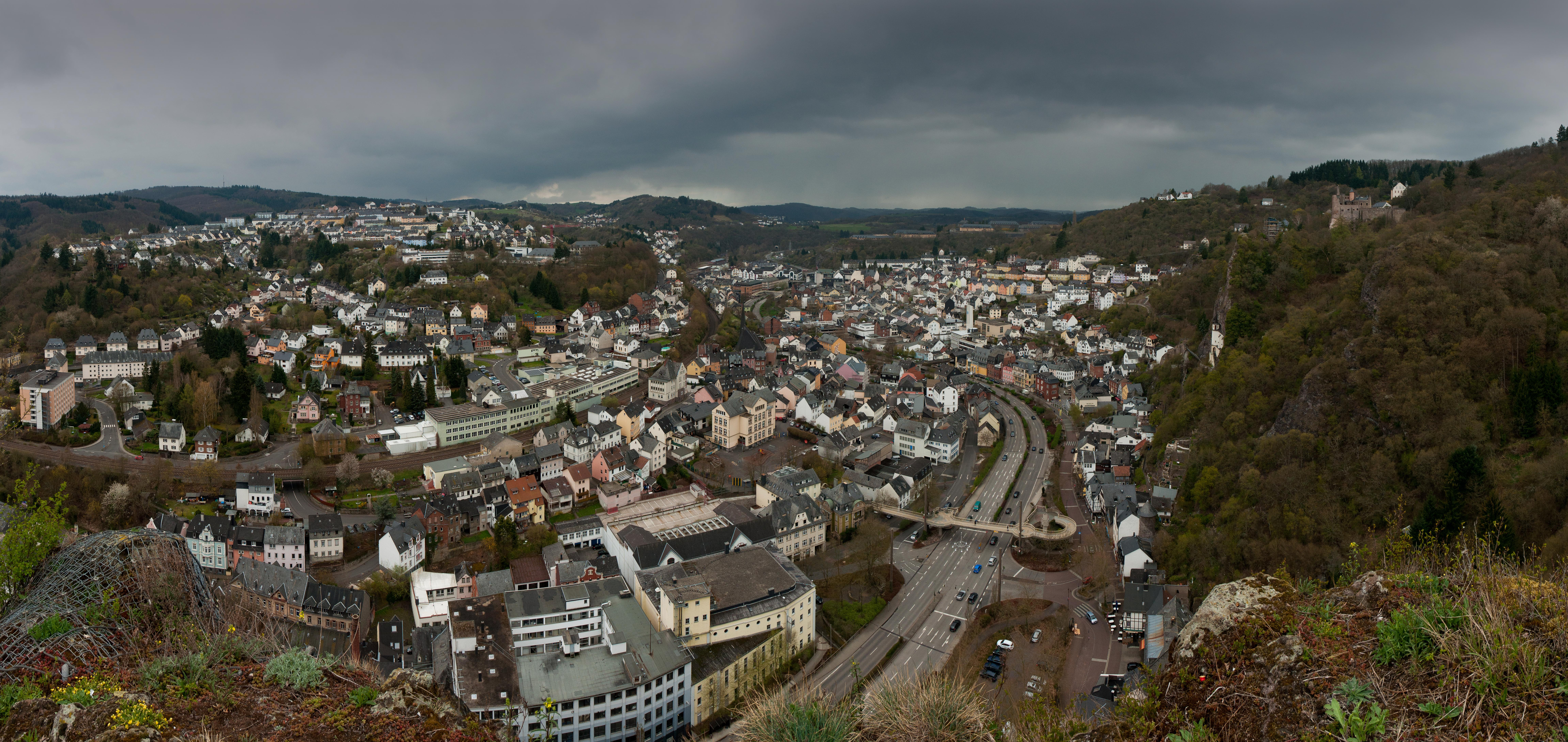 Panorama Idar-Oberstein mit Museum, Felsenkirche und Schloss